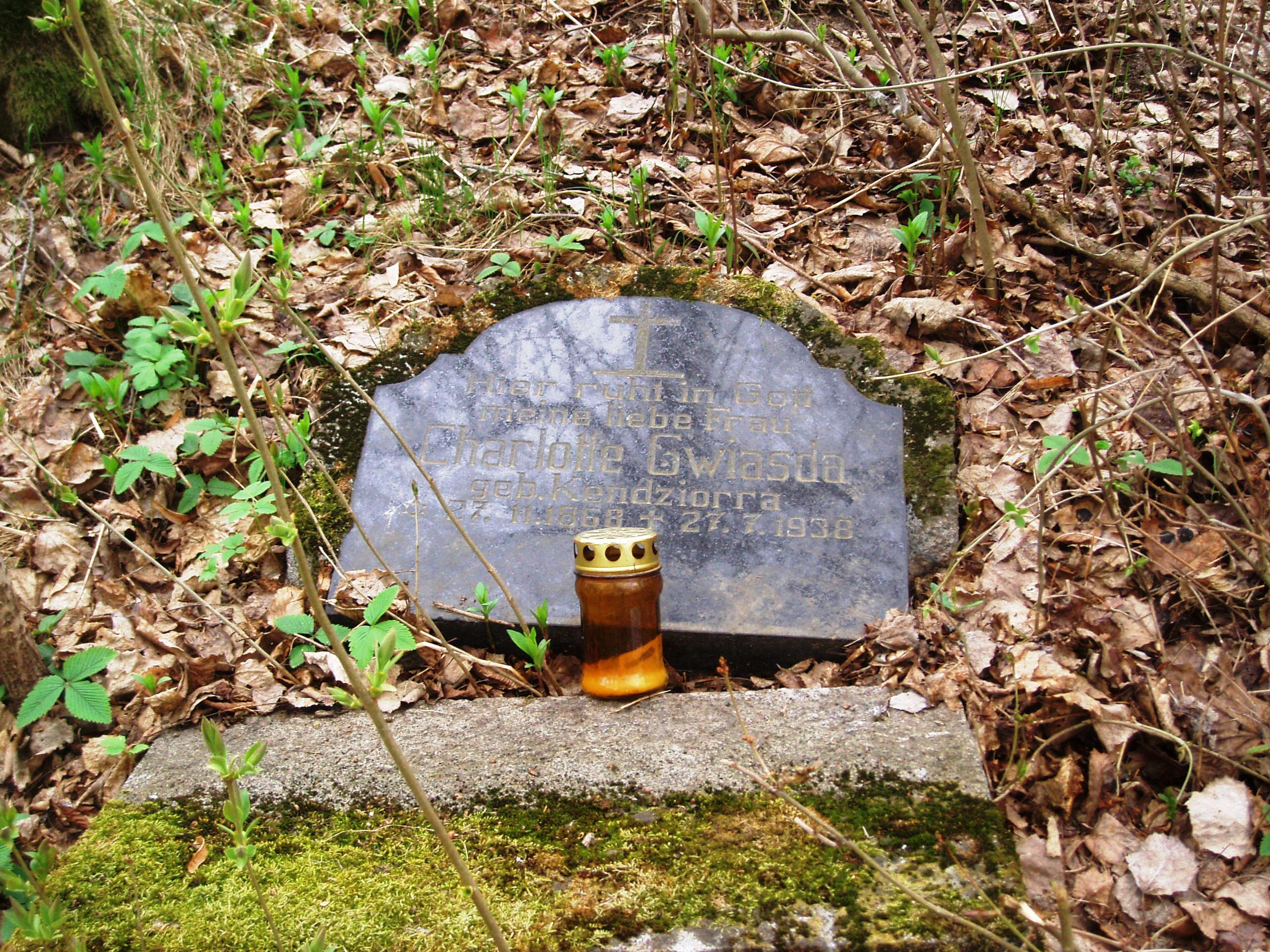 Cmentarz rodzinny w Bałdach (Warmia)